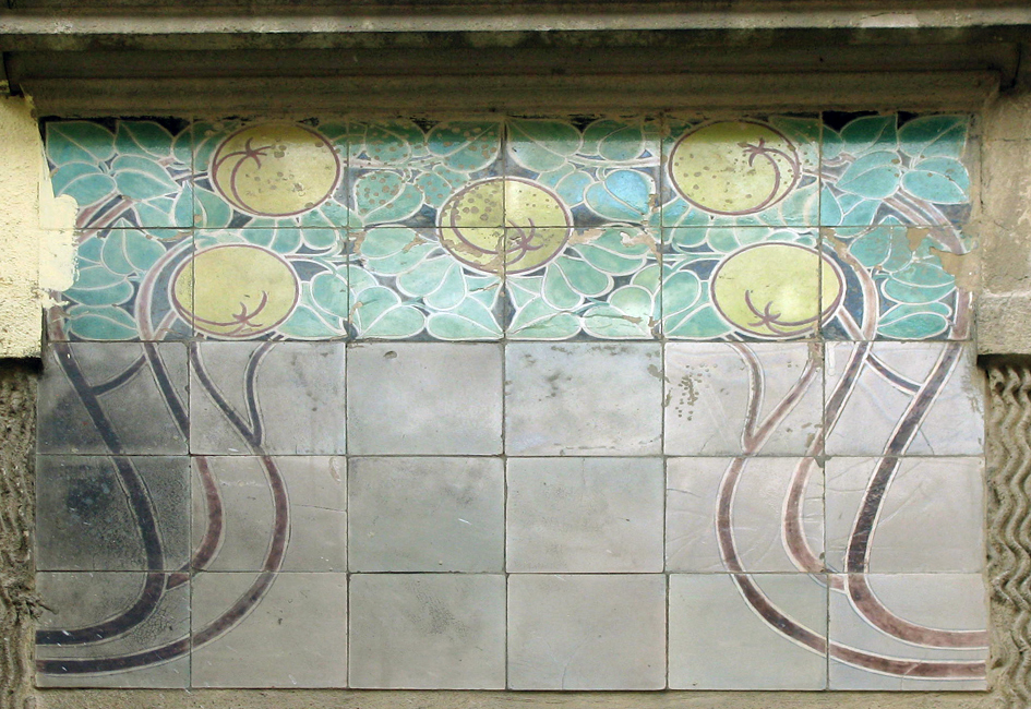 Дім №4 по вулиці академіка Павлова. Керамічне панно на фасаді із зображенням лимонів.